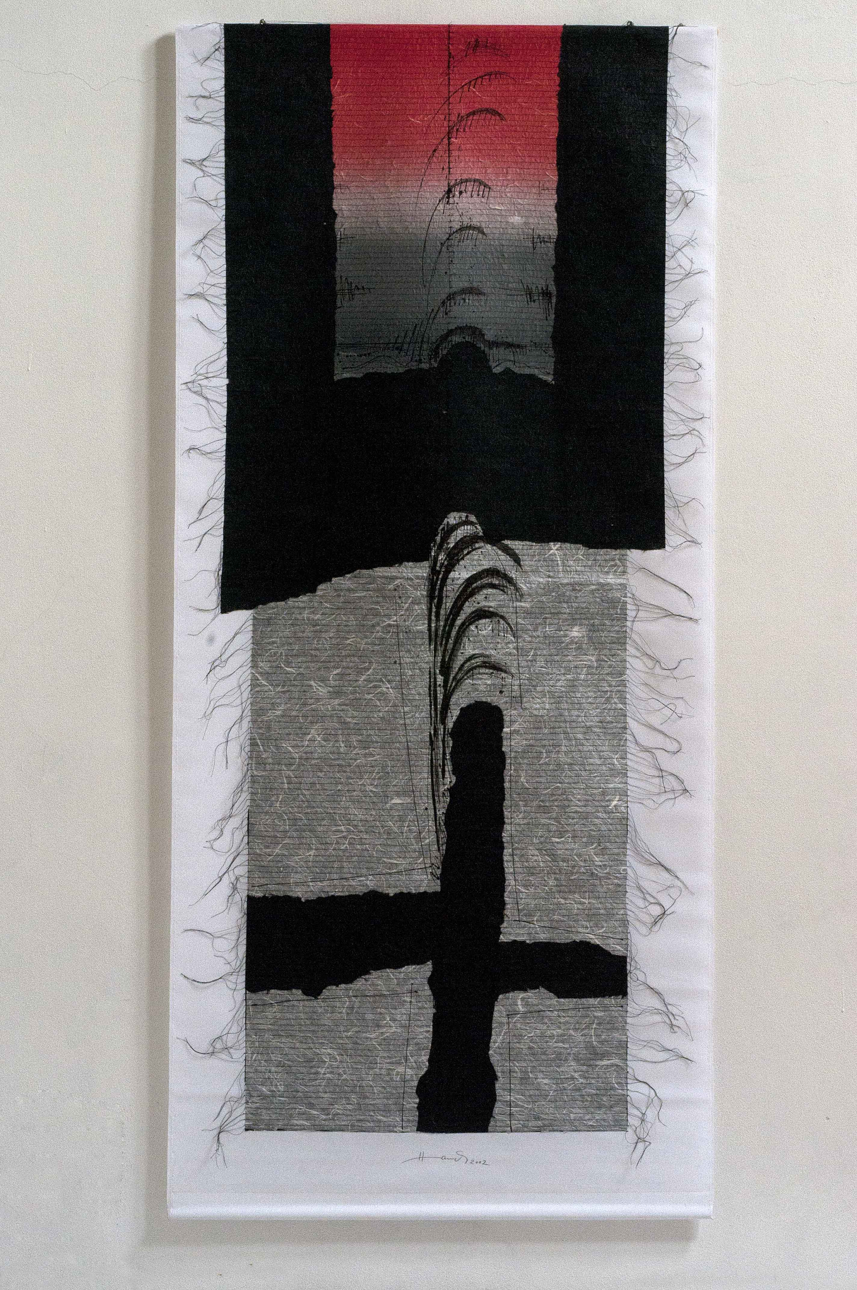 Josef Hampl, Vzlínání, šitá koláž na plátně, 200x90 cm, 2002